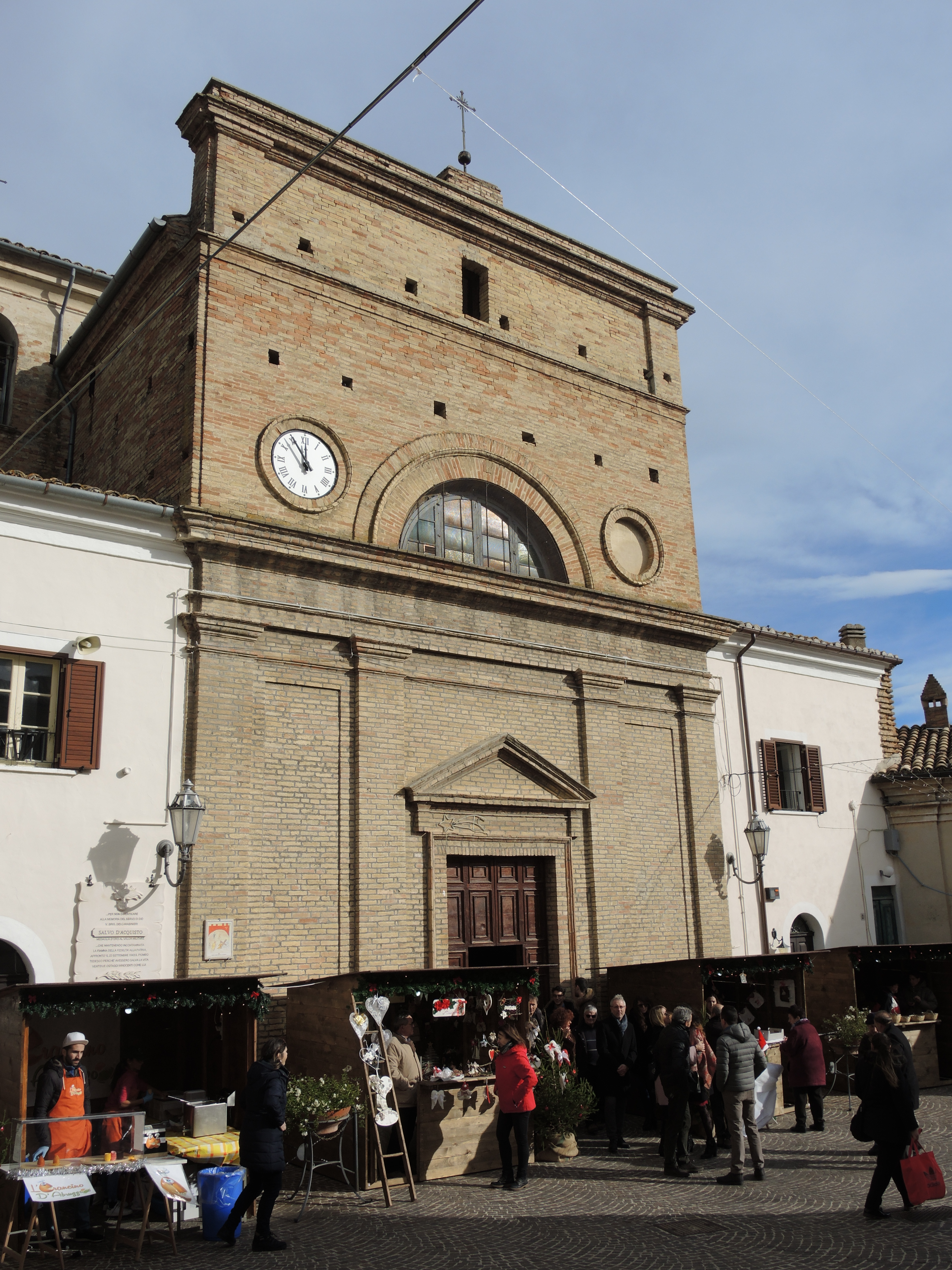 Casalincontrada; Chiesa di Santa Maria delle Grazie